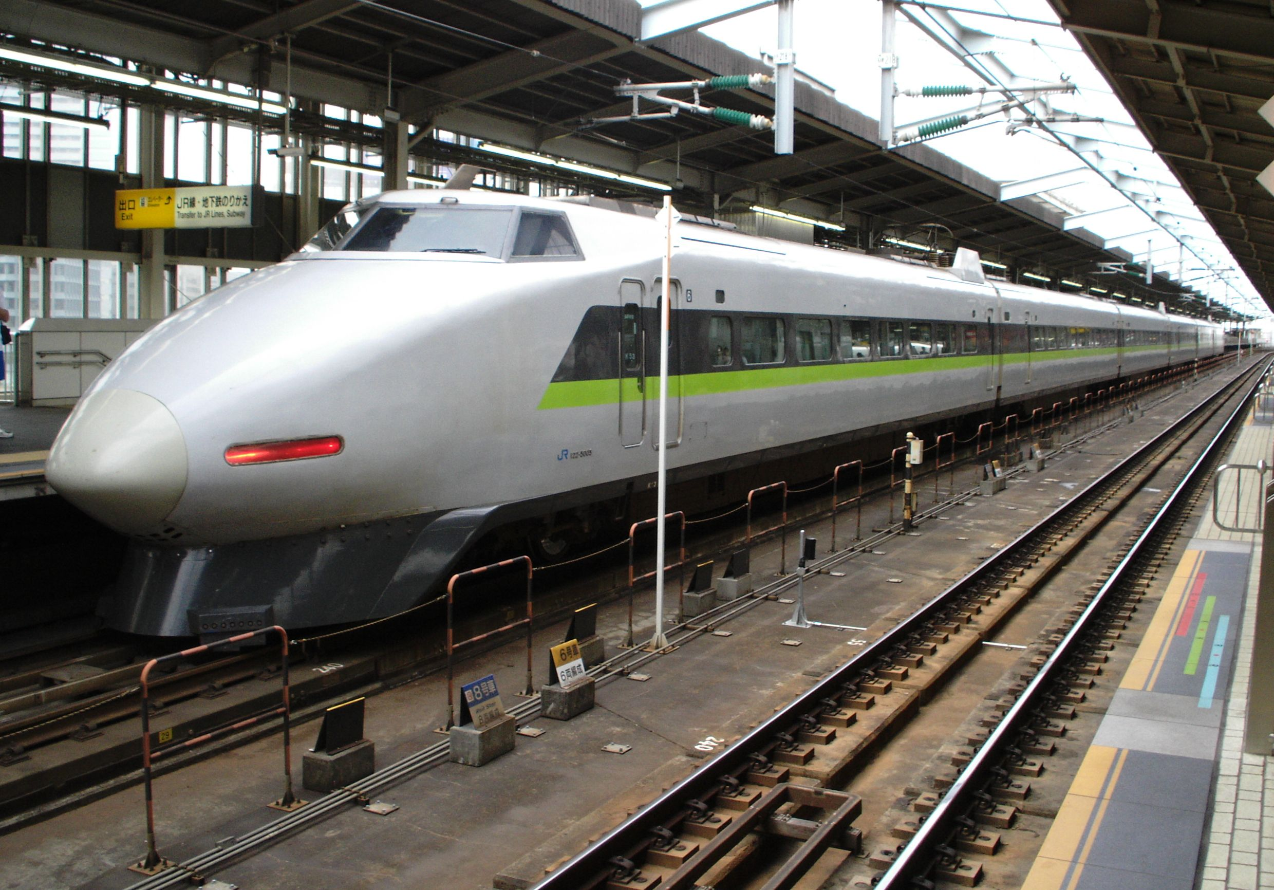 100系新幹線電車新塗装